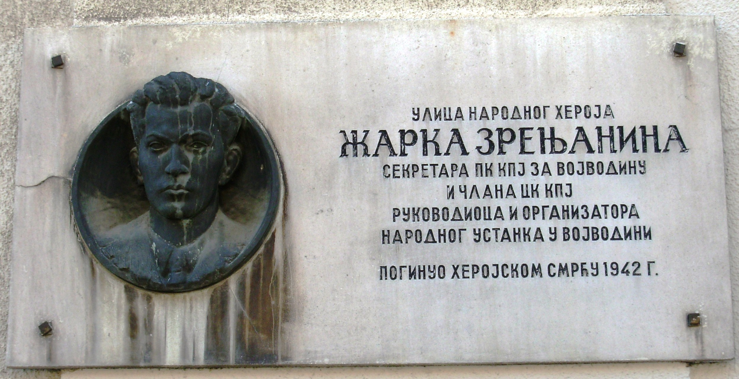 Табла у бившој улици Жарка Зрењанина у Београду. Данас улица Војводе Стевана Шупљикца. Сликао Голдфингер